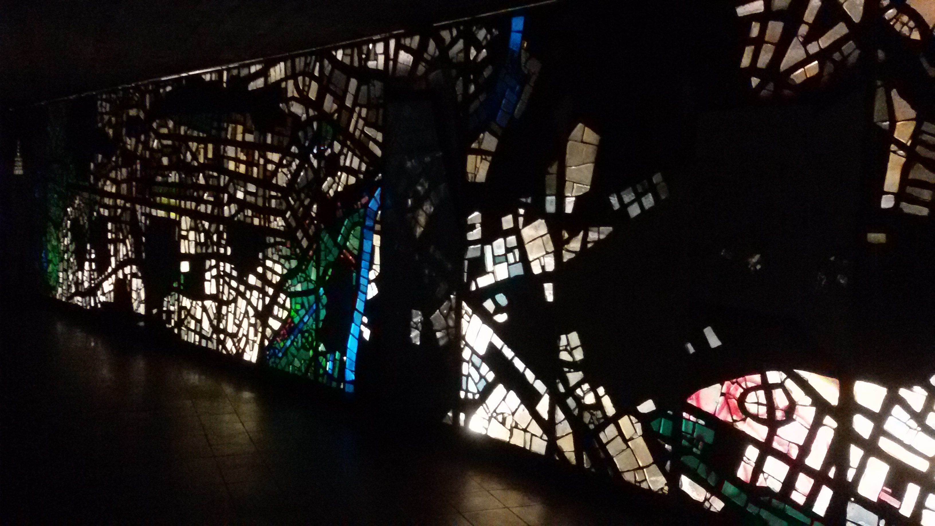 Das Glasmosaik befindet sich unter dem Vorplatz des Kasseler Hauptbahnhofs im Untergrund.